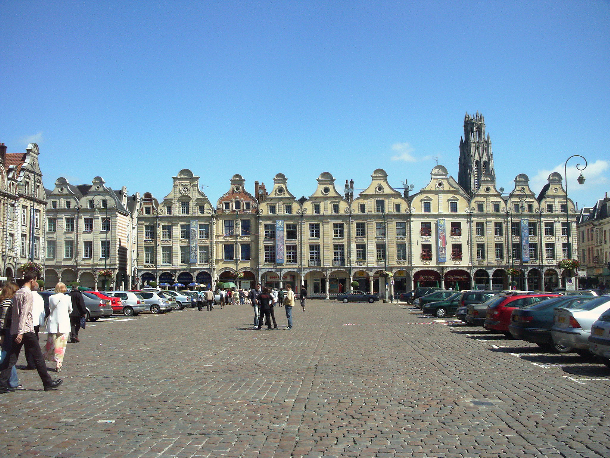 Marktplatz von Arras (Frankreich).